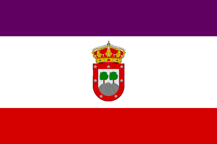 Bandera Municipal de Tres Cantos (Madrid)